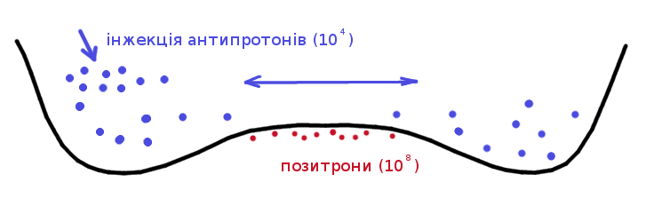 Схематична будова пастки для сумісного зберігання і подальшої рекомбінації позитронів і антипротонів.